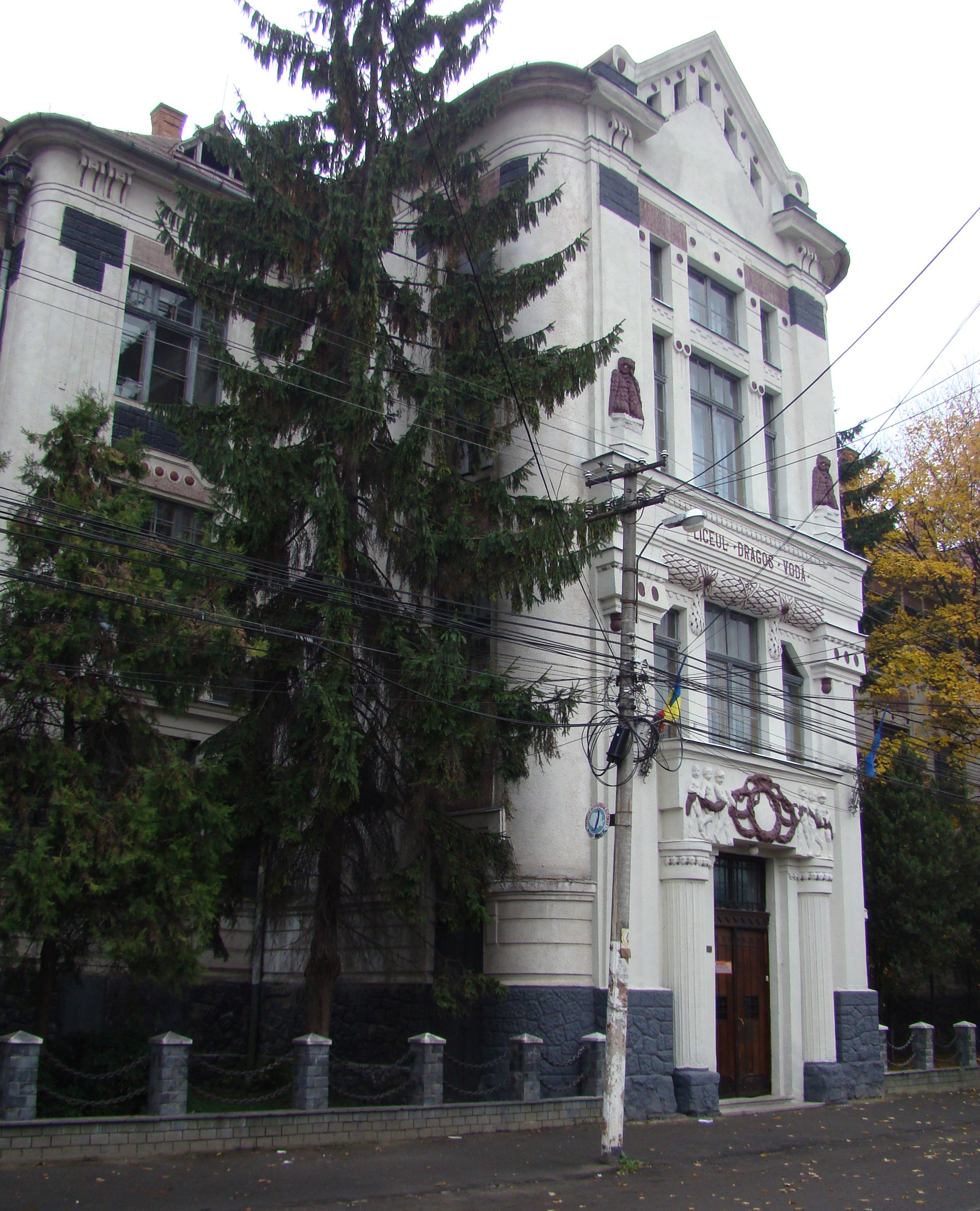 Liceul "Dragoș Vodă", municipiul Sighetu Marmației, Str. Mihai Viteazul 14